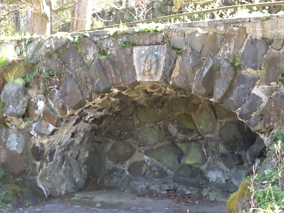 bývalé sídlo Kyselka 2014